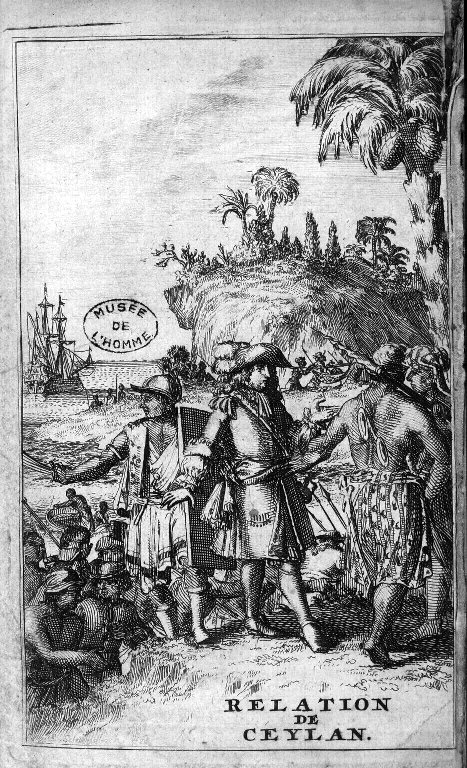 Robert Knox arrivant à Ceylan